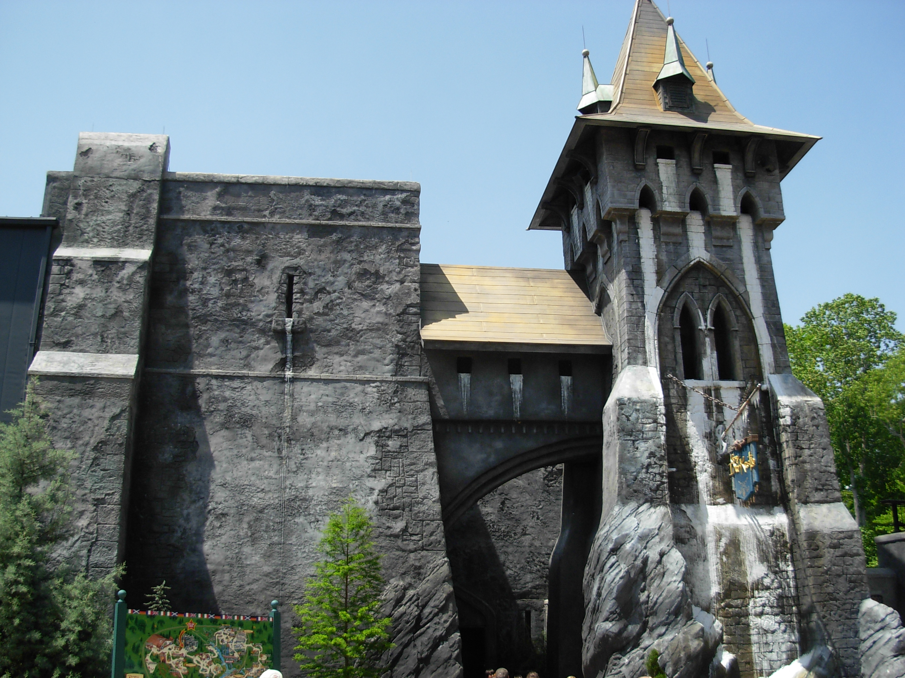 Busch Gardens Europe, Williamsburg Roller coasters Amusement rides